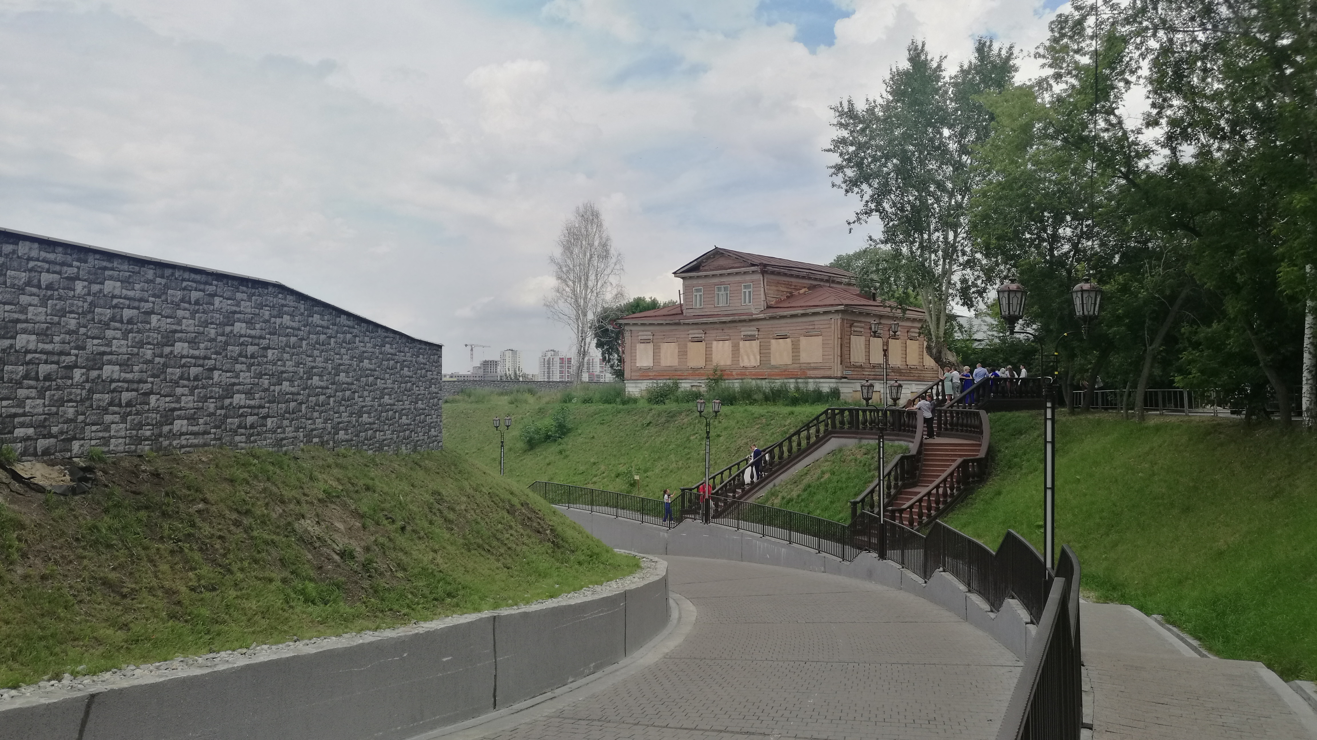 Masljanskij vojo. Tjumeno, Rusio.